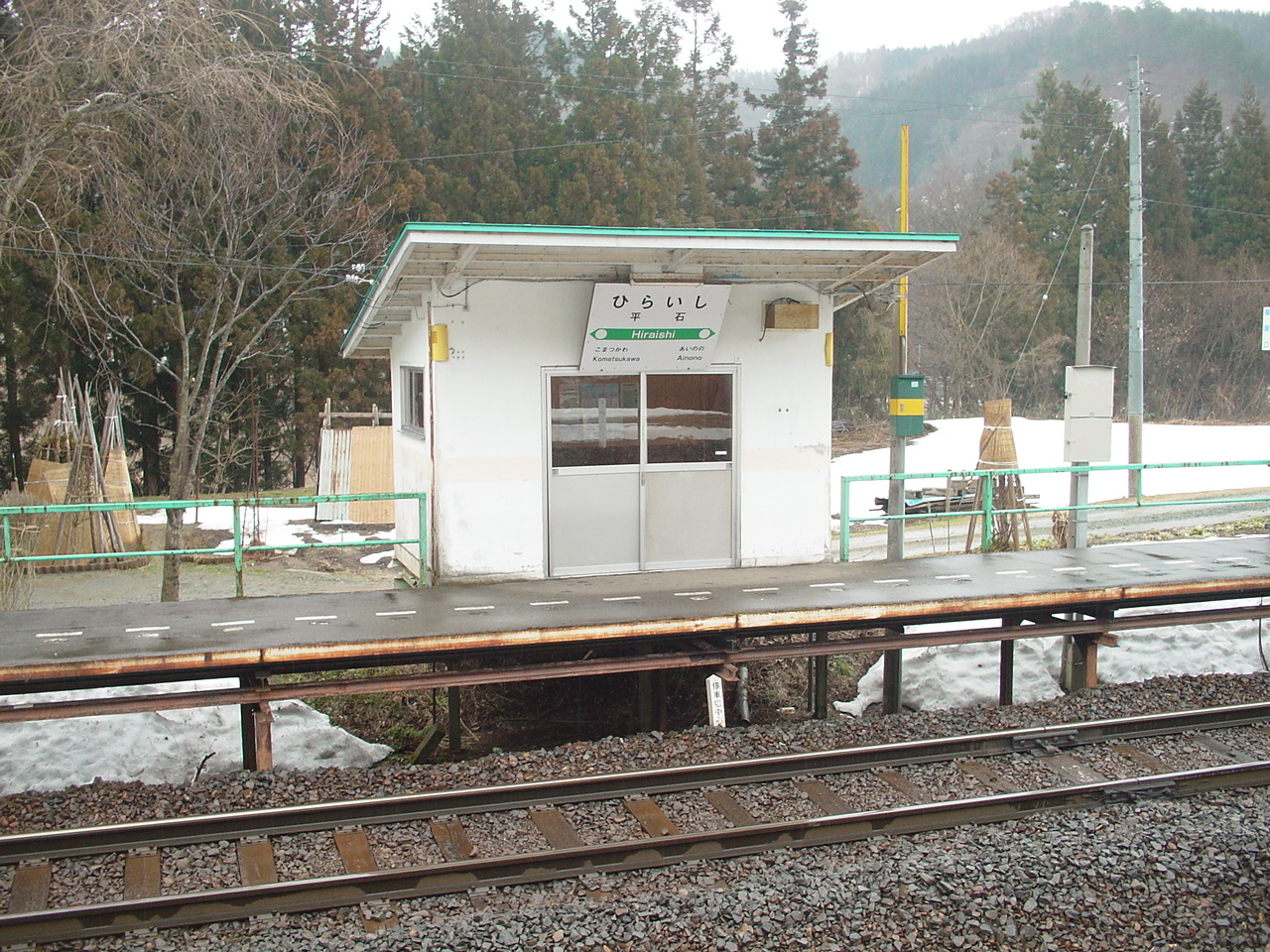 （平石駅）